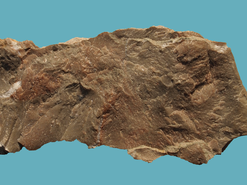 Vzorek vápence pochází z lomu Malá Amerika v Českém krasu. Skutečná šířka záběru je 12 cm.